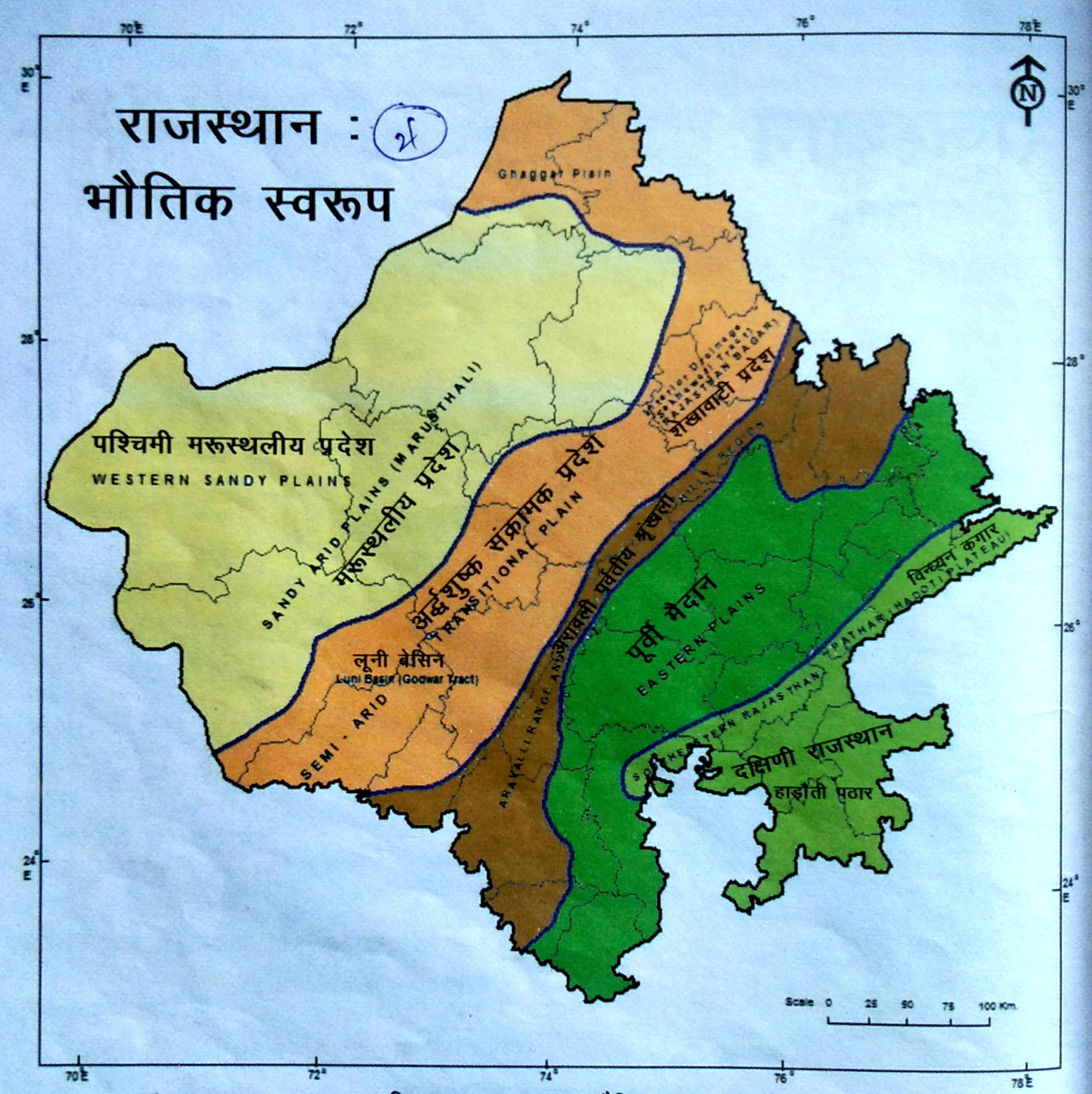 राजस्थान के भौतिक भाग